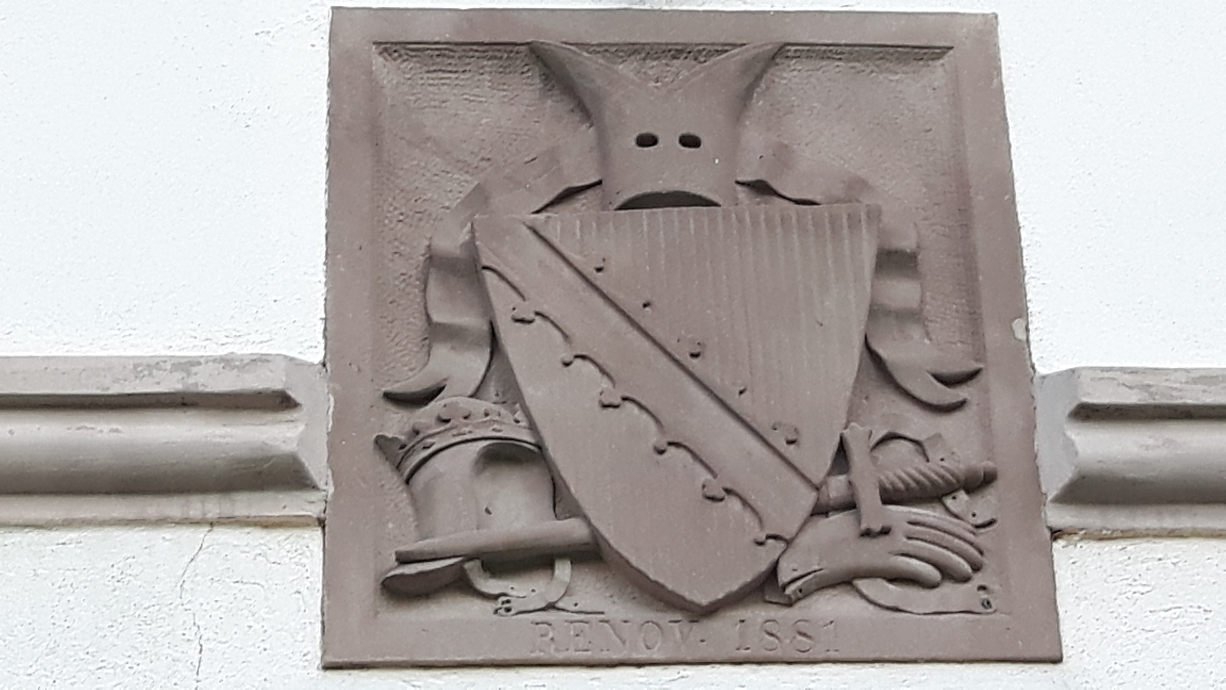 blason des comtes de werde, le centre correspond aux armes de la basse alsace